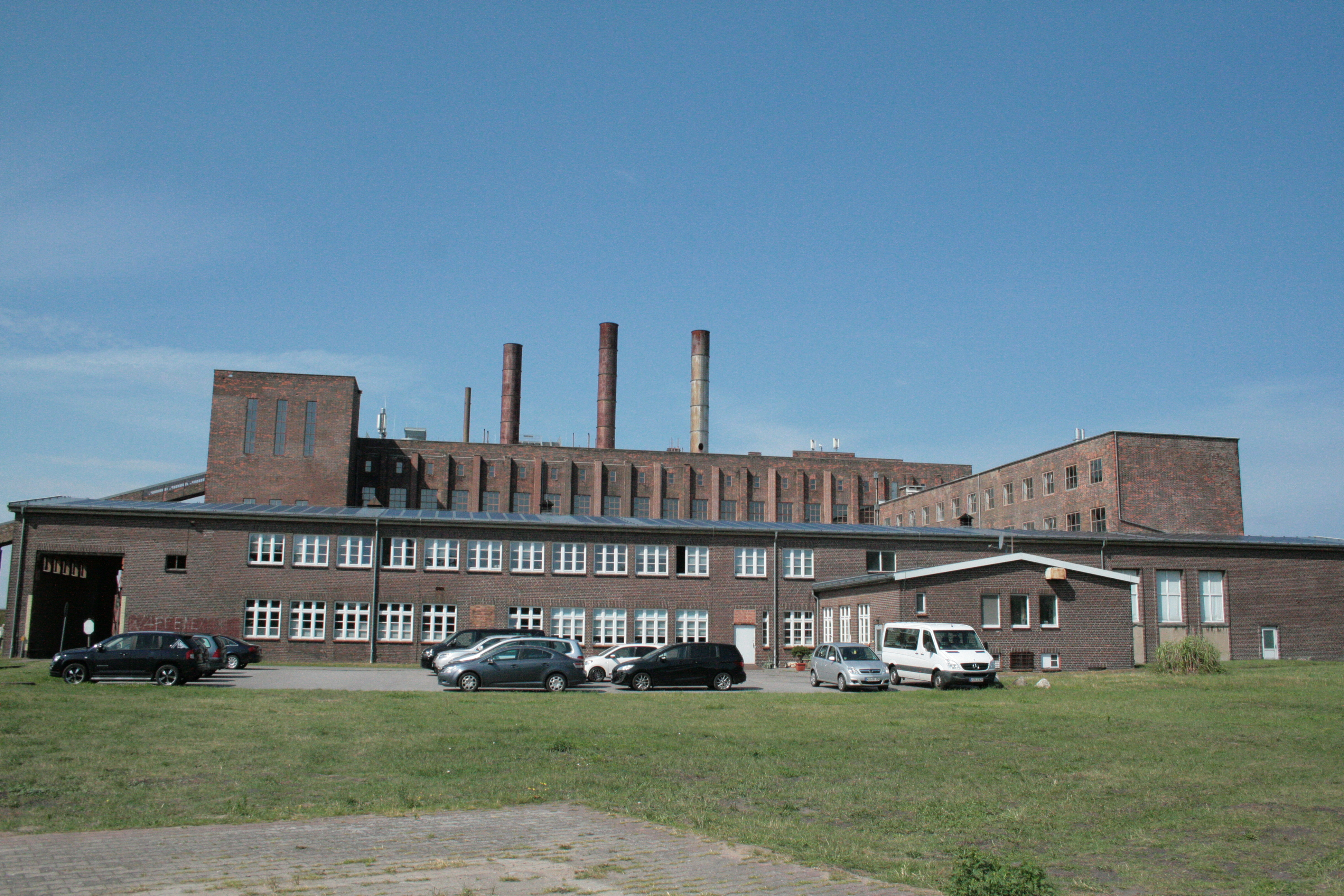 Objekt bývalé tepelné elektrárny v areálu raketové základny v Peenemünde.